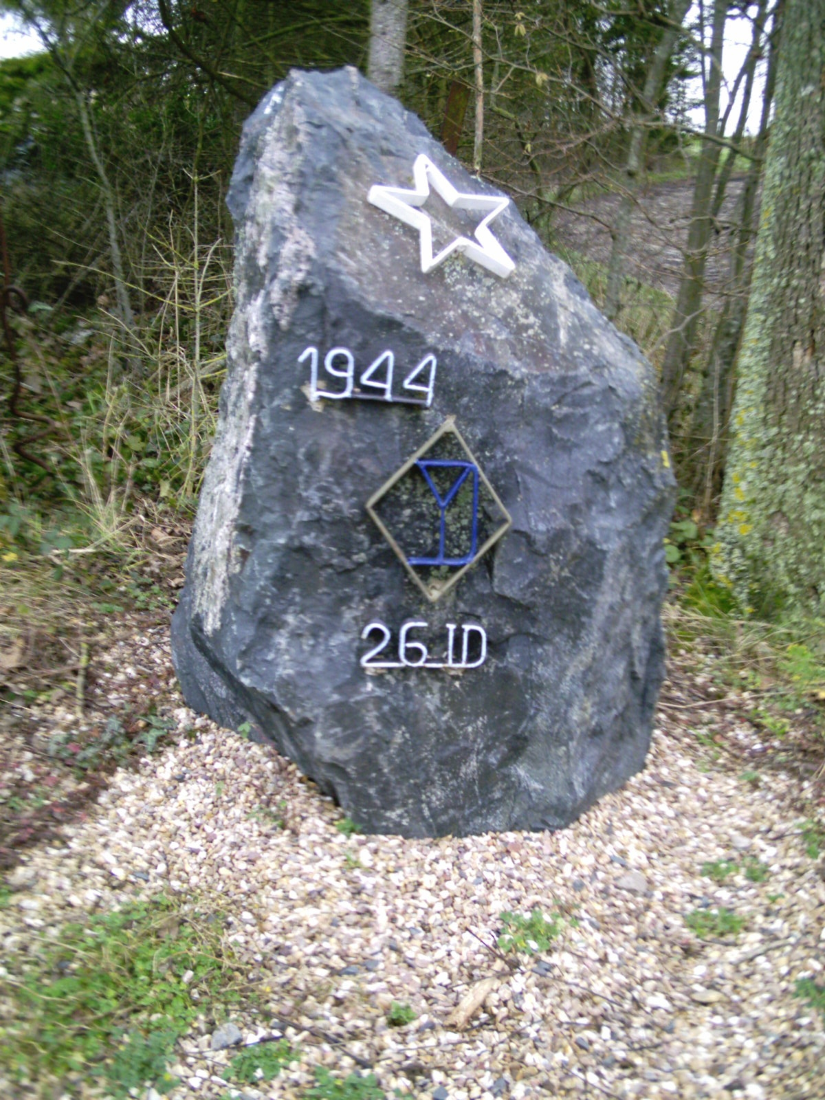 Stelle Commemorative de la 26ème division d'infanterie de l'US Army.